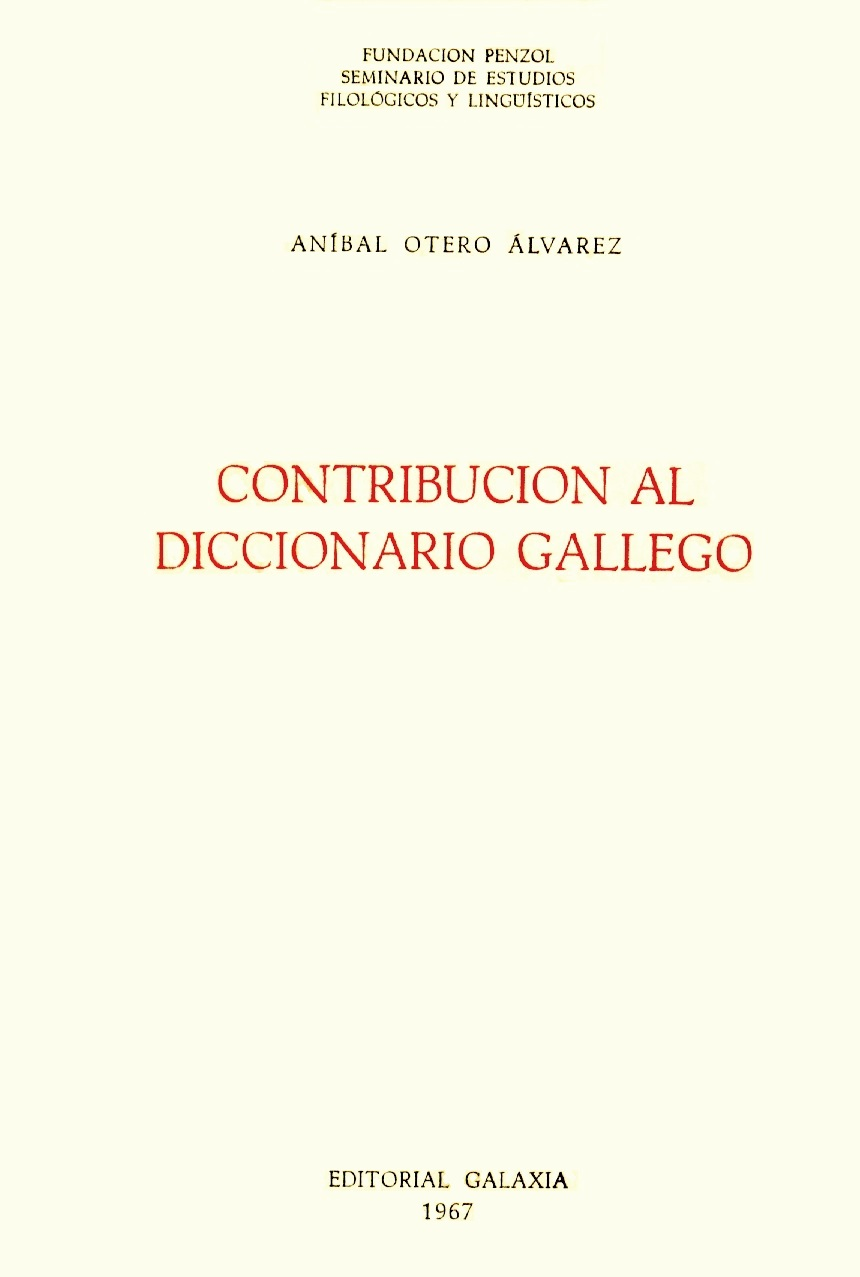 Contribución al diccionario gallego.